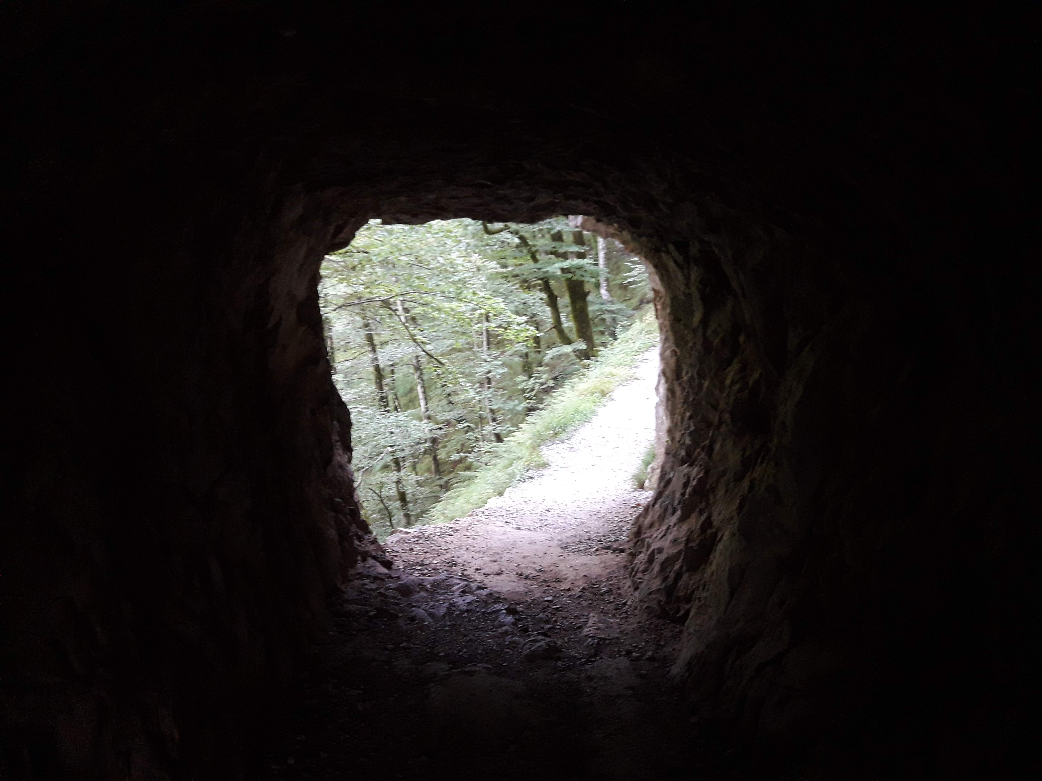 Camí del coll de Lizarrusti a l'embassament de Lareo. Camí lleuger ideal per fer un passeig matinal. Lizarrustitik Lareoara bidea.